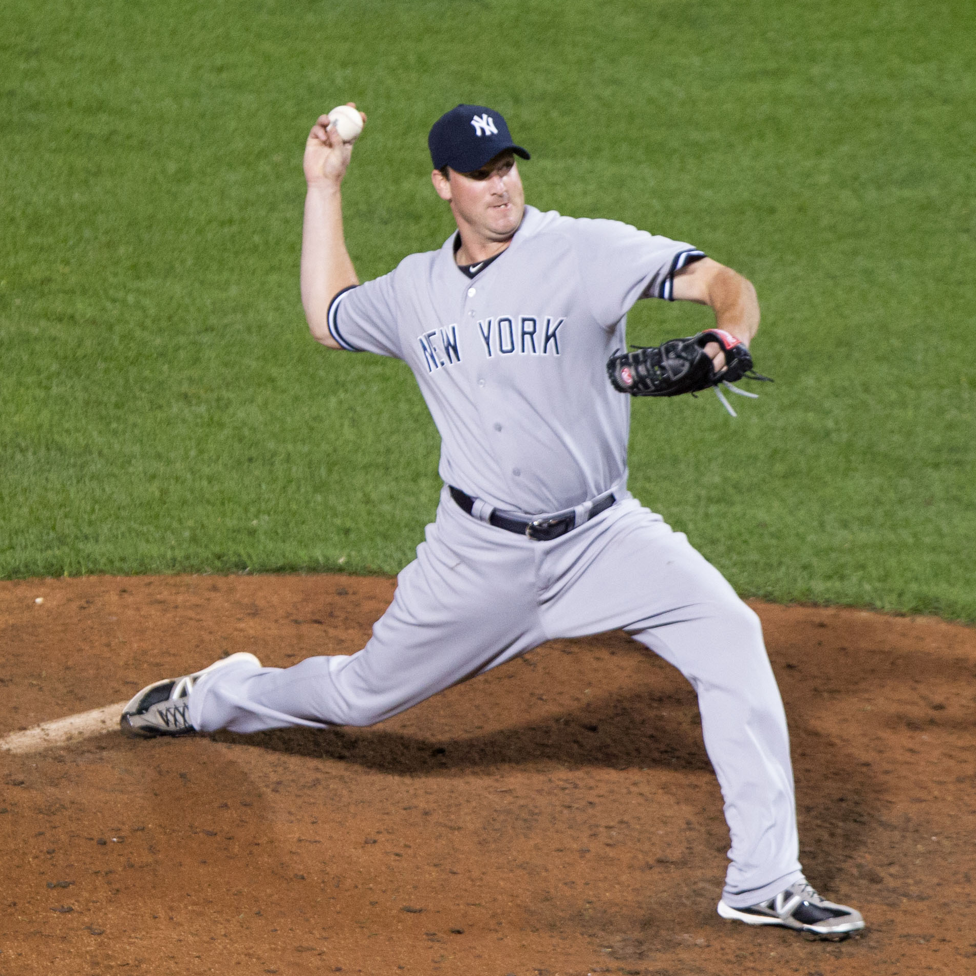 Derek Lowe